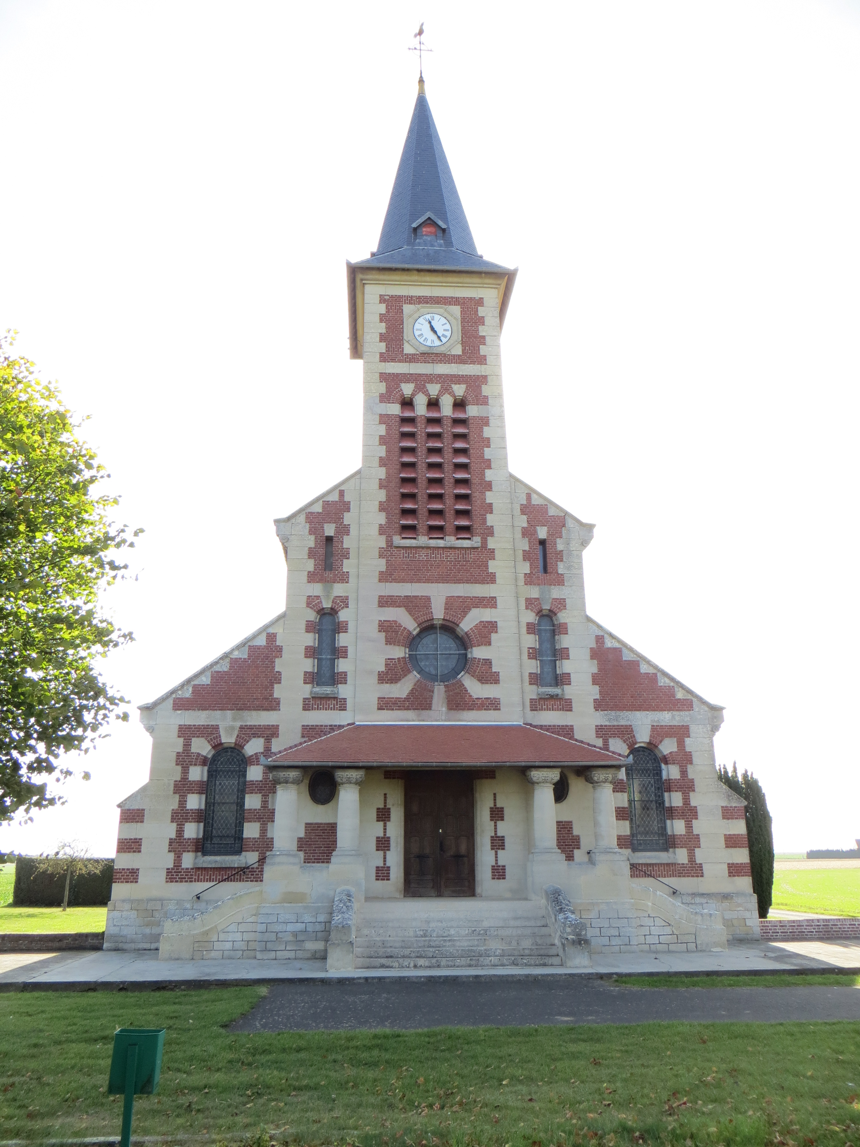 Vue générale de l'église